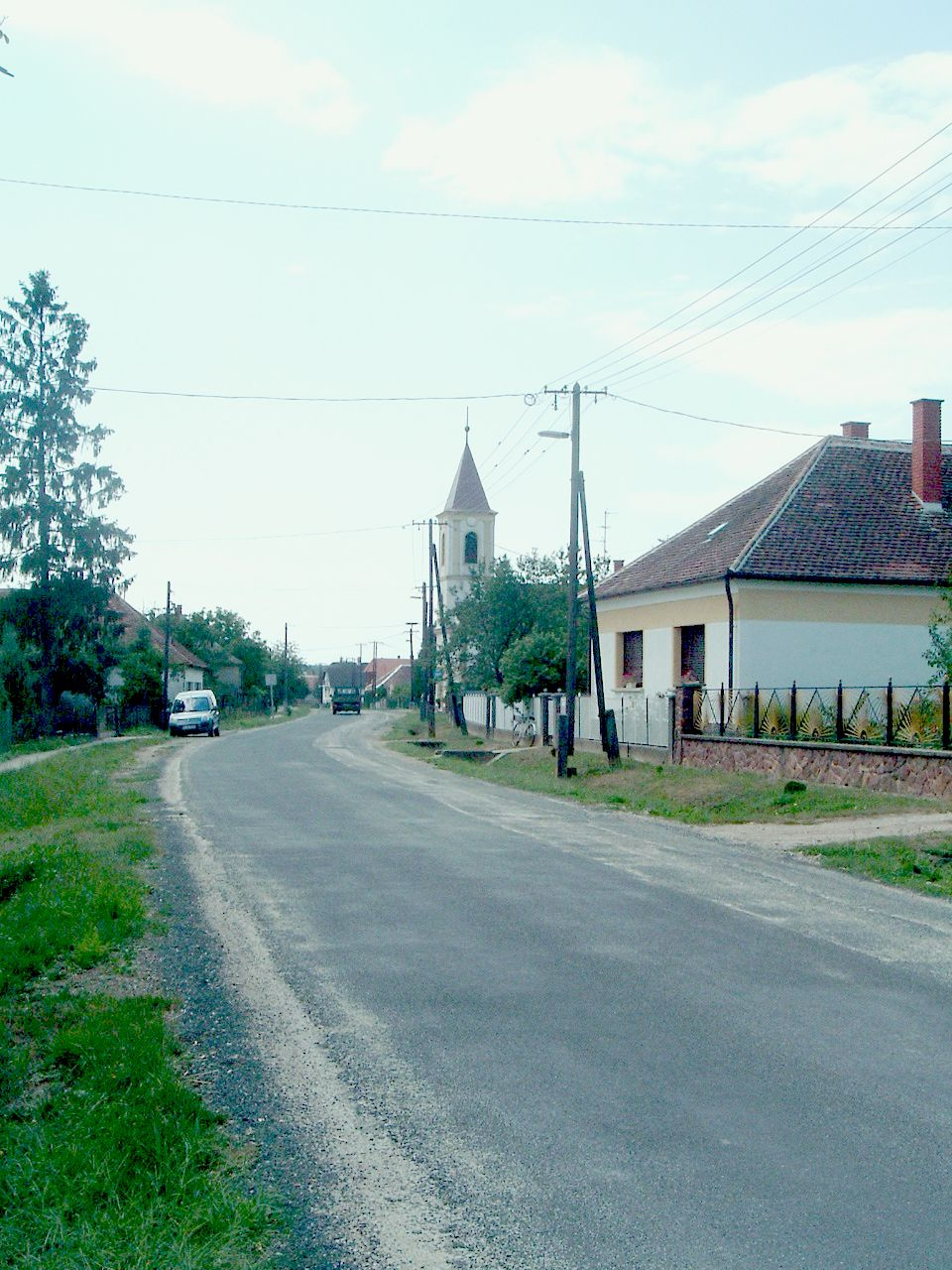 Rádóckölked